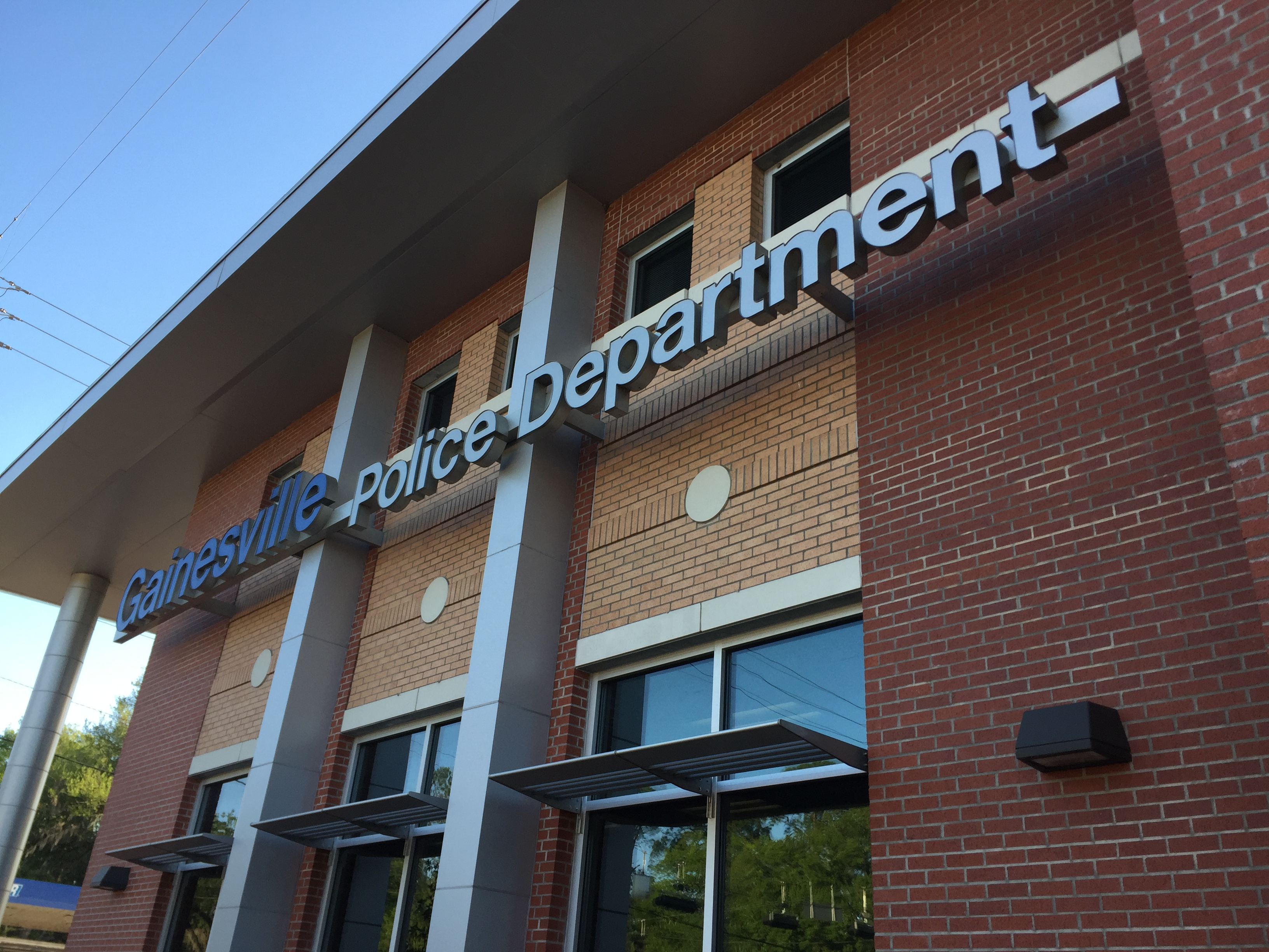 Gainesville Police Department